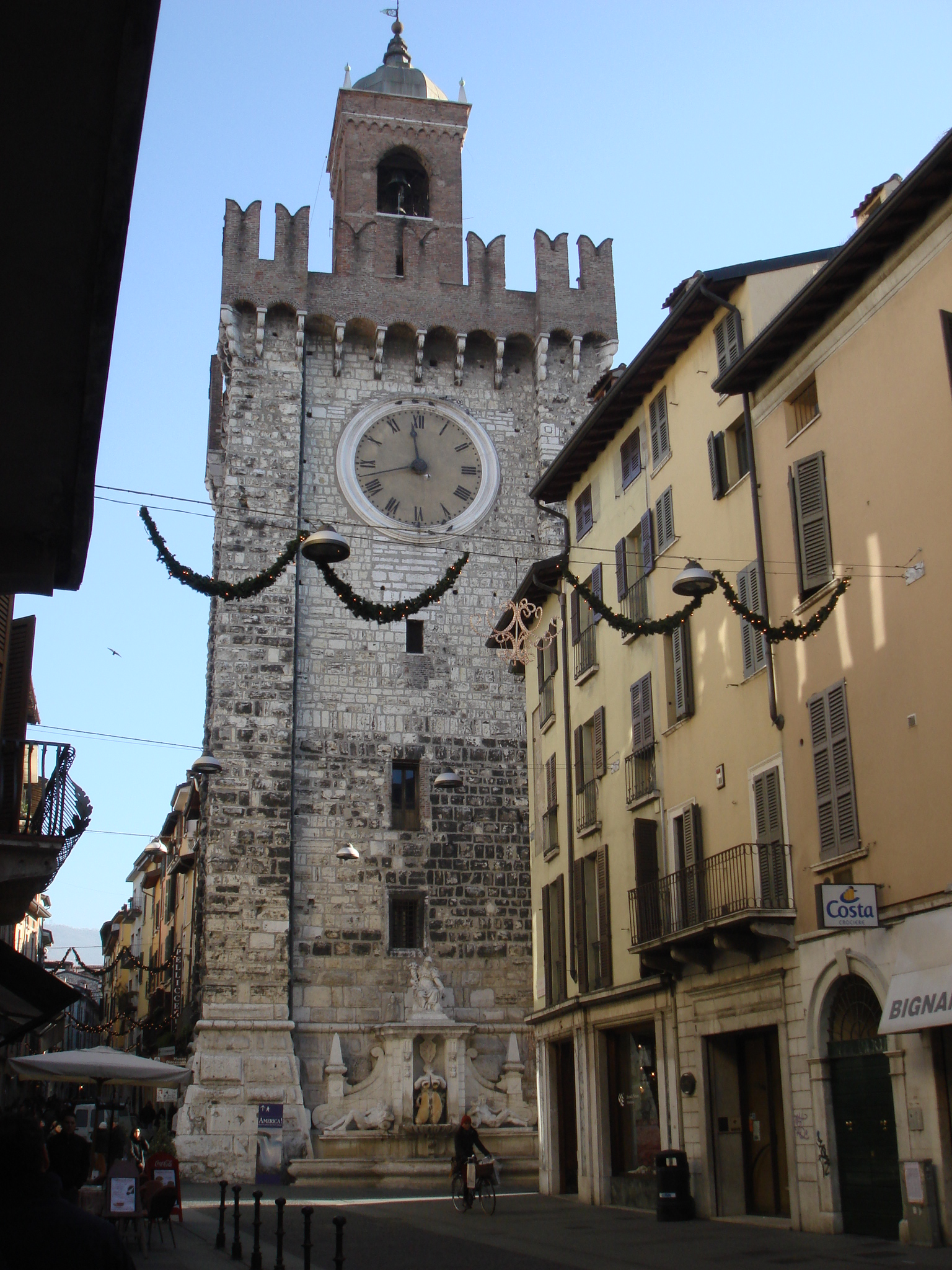 Torre della Pallata (Brescia) (XIII sec.)